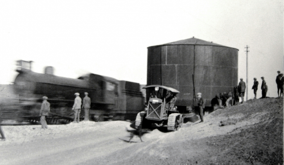 Transporte de tanque junto a las vías del ferrocarril de Comodoro